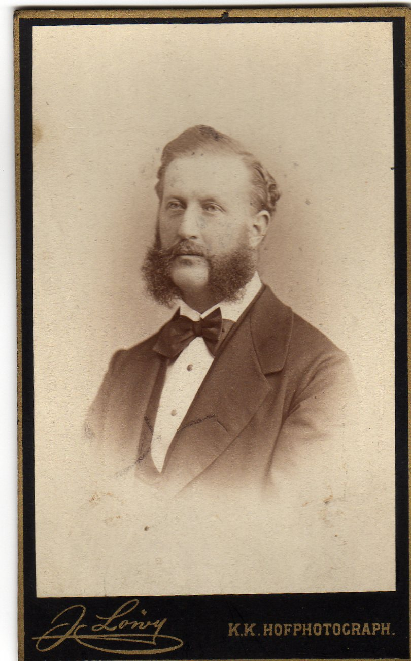 Anton August Graf von Attems-Gilleis, Freiherr von Heiligenkreuz, 1834-1891, K.u.K. Kämmerer, OLt.a.D., Herr d. Gilleis´schen Fkm. u. d. Herrschaft Therasburg, Sohn des Hermann Gf. v. Attems, 1800-1874, und der Leopoldine, 1807-1875, geb. Gfin. v. Gilleis, StkrD.